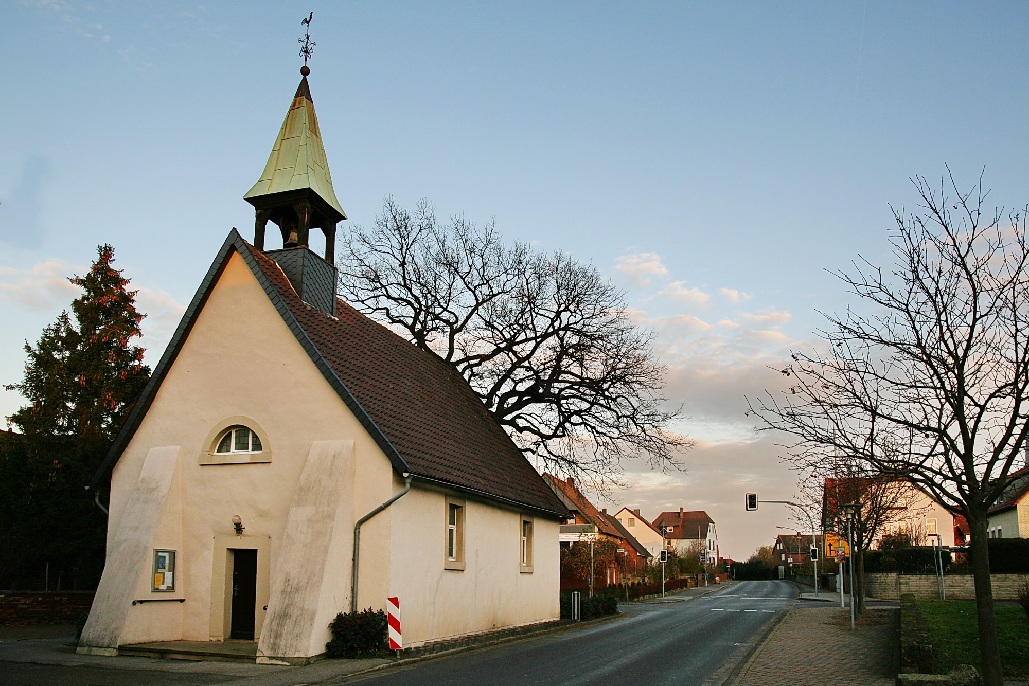 Kapelle aus dem 12. Jahrhundert in Langreder (Barsinghausen), Niedersachsen, Deutschland